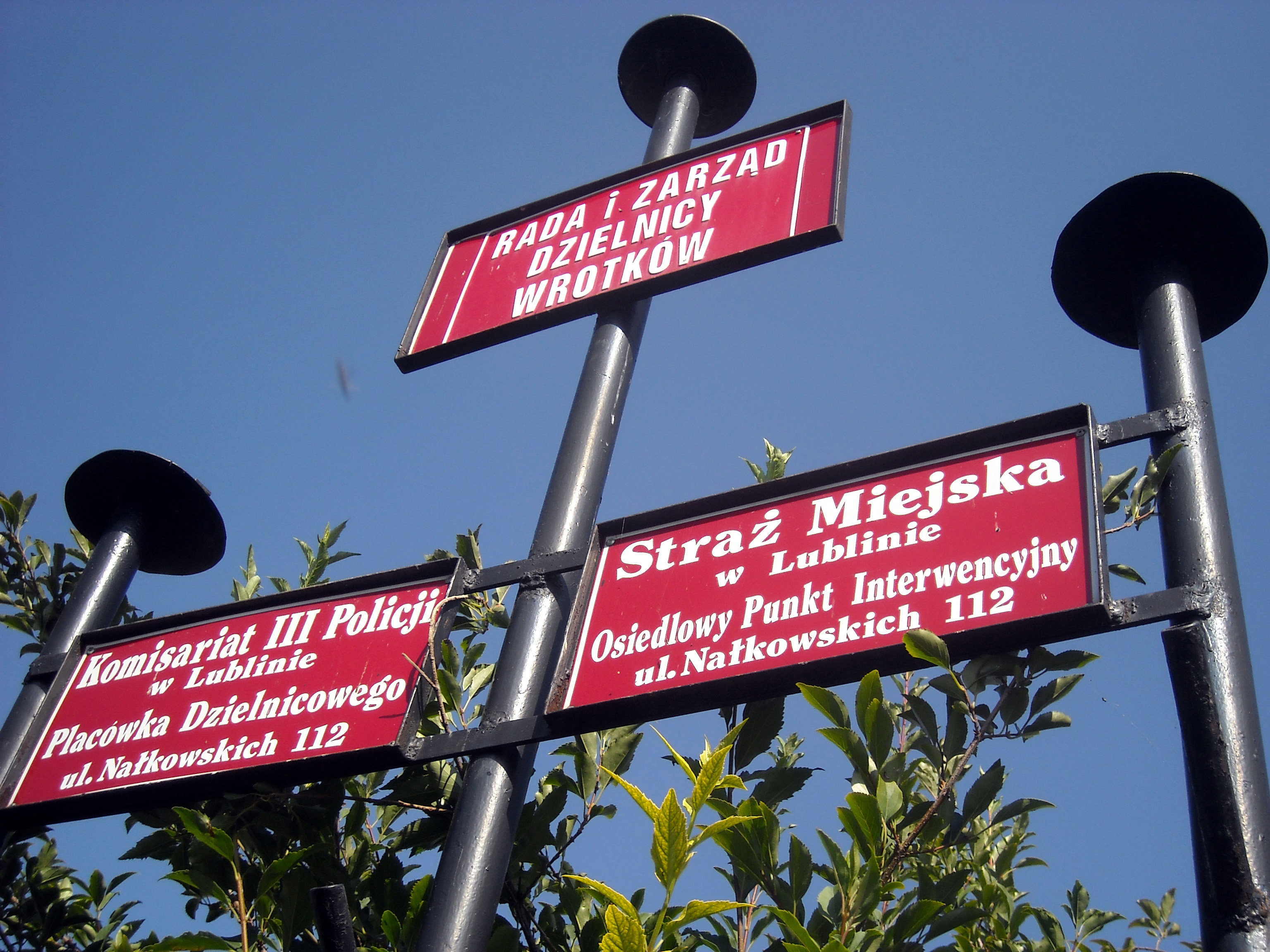 Rada Dzielnicy Wrotków - tablica informacyjna tuż przy siedzibie na ul. Nałkowskich w Lublinie